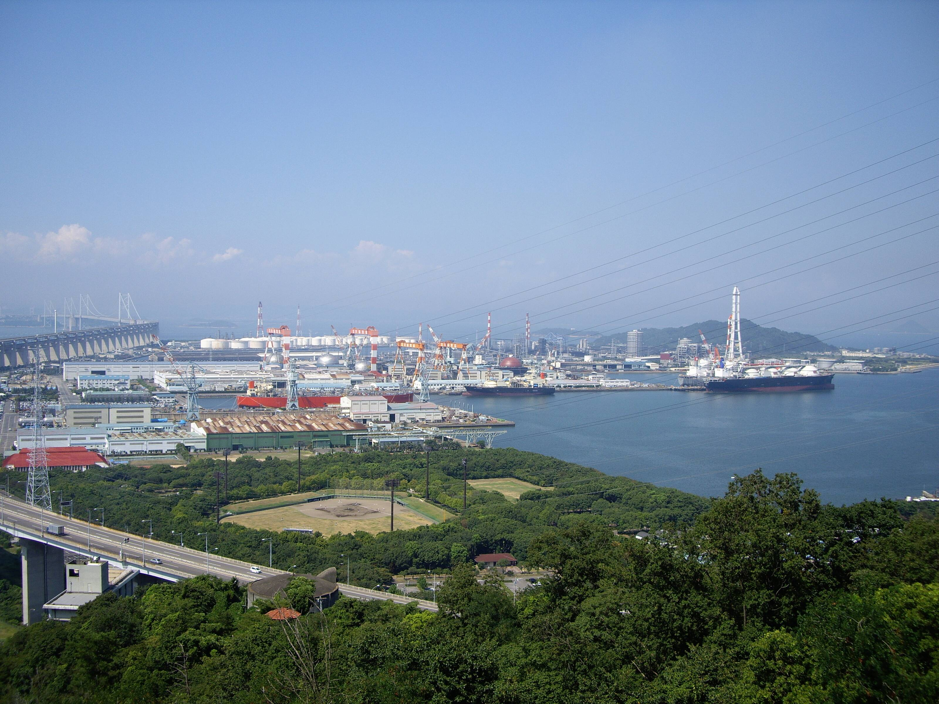 番の州工業地帯と番の州公園 - 日本国香川県坂出市